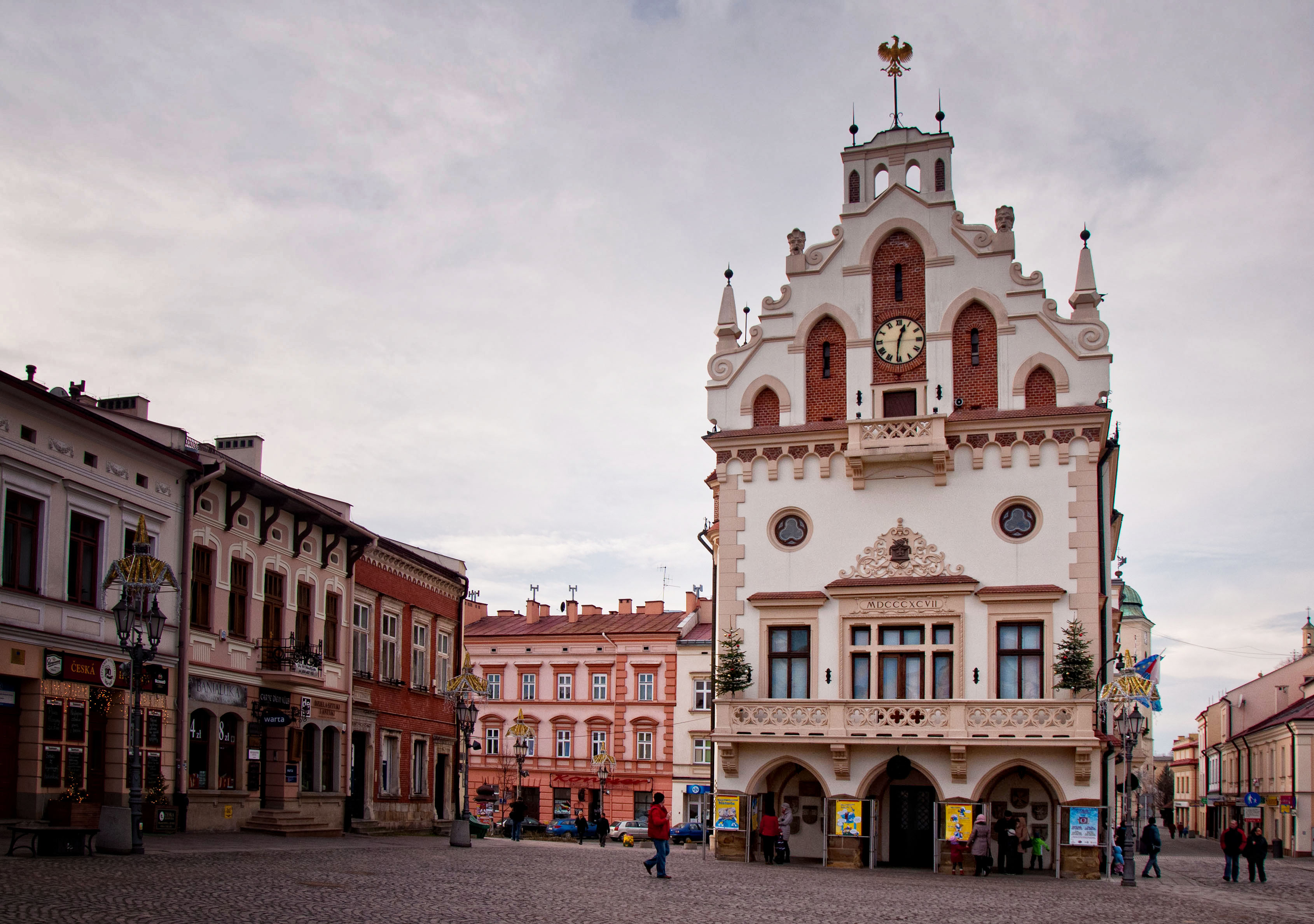 Rzeszów, ratusz, XVII, 1897-1900